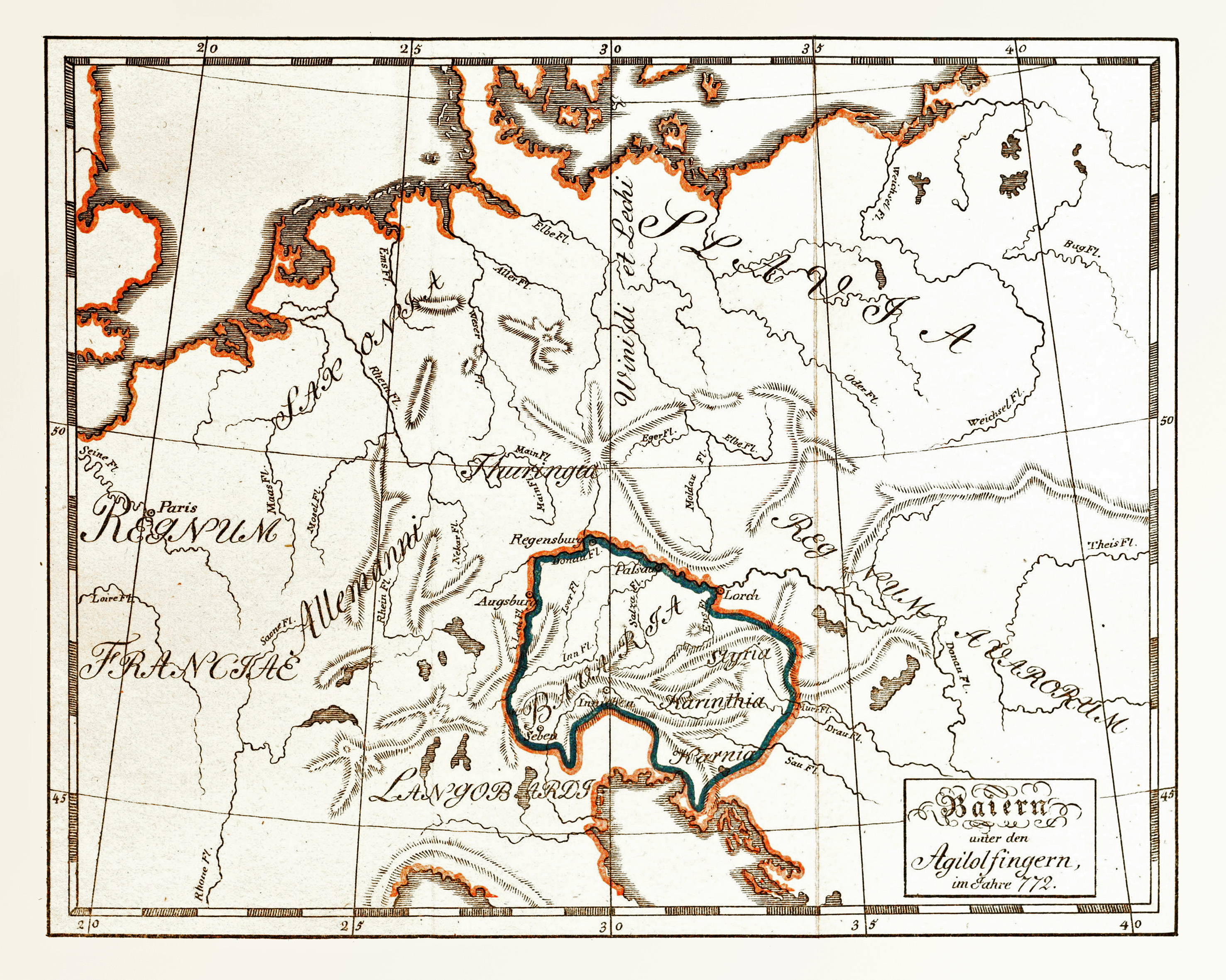 Baiern unter den Agilolfingern im Jahre 772. Original size 22 by 17 cm, scale 1:7,600,000, further information